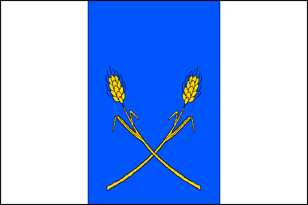 vlajka, Šanov, okres Znojmo